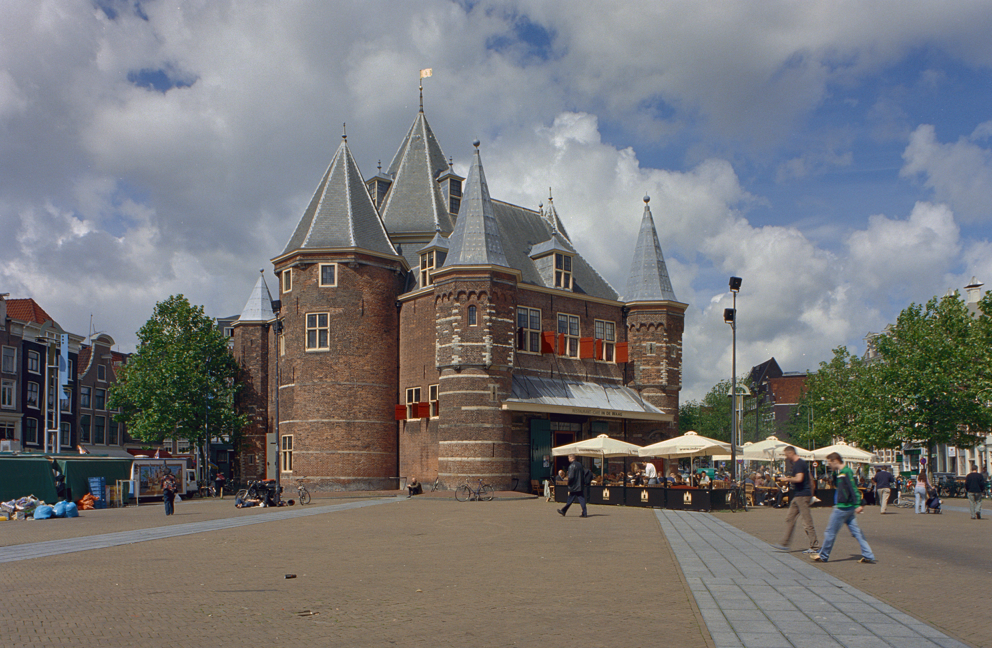 De Waag: Overzicht